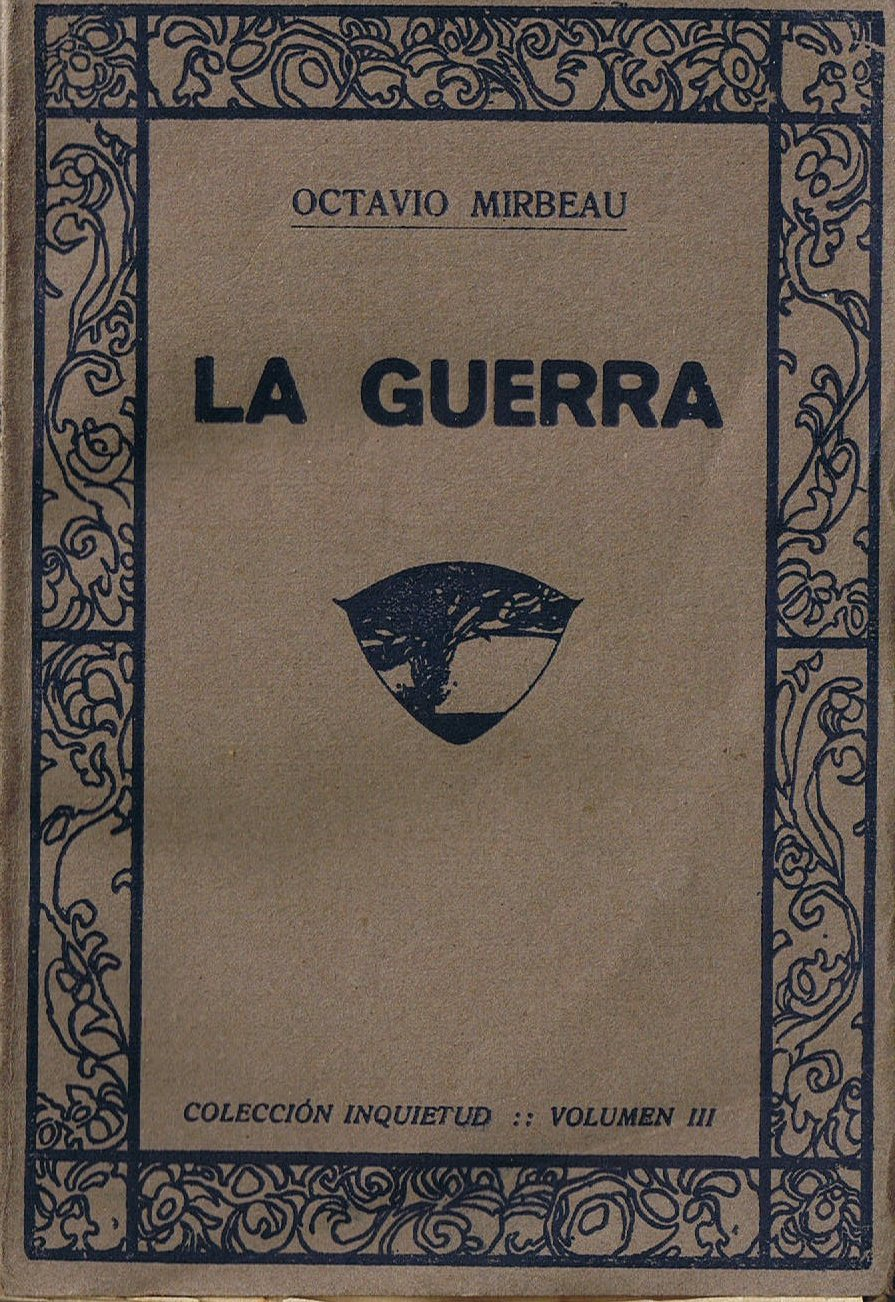 couverture de La guerra, traduction espagnole de textes d'Octave Mirbeau (1848-1917)